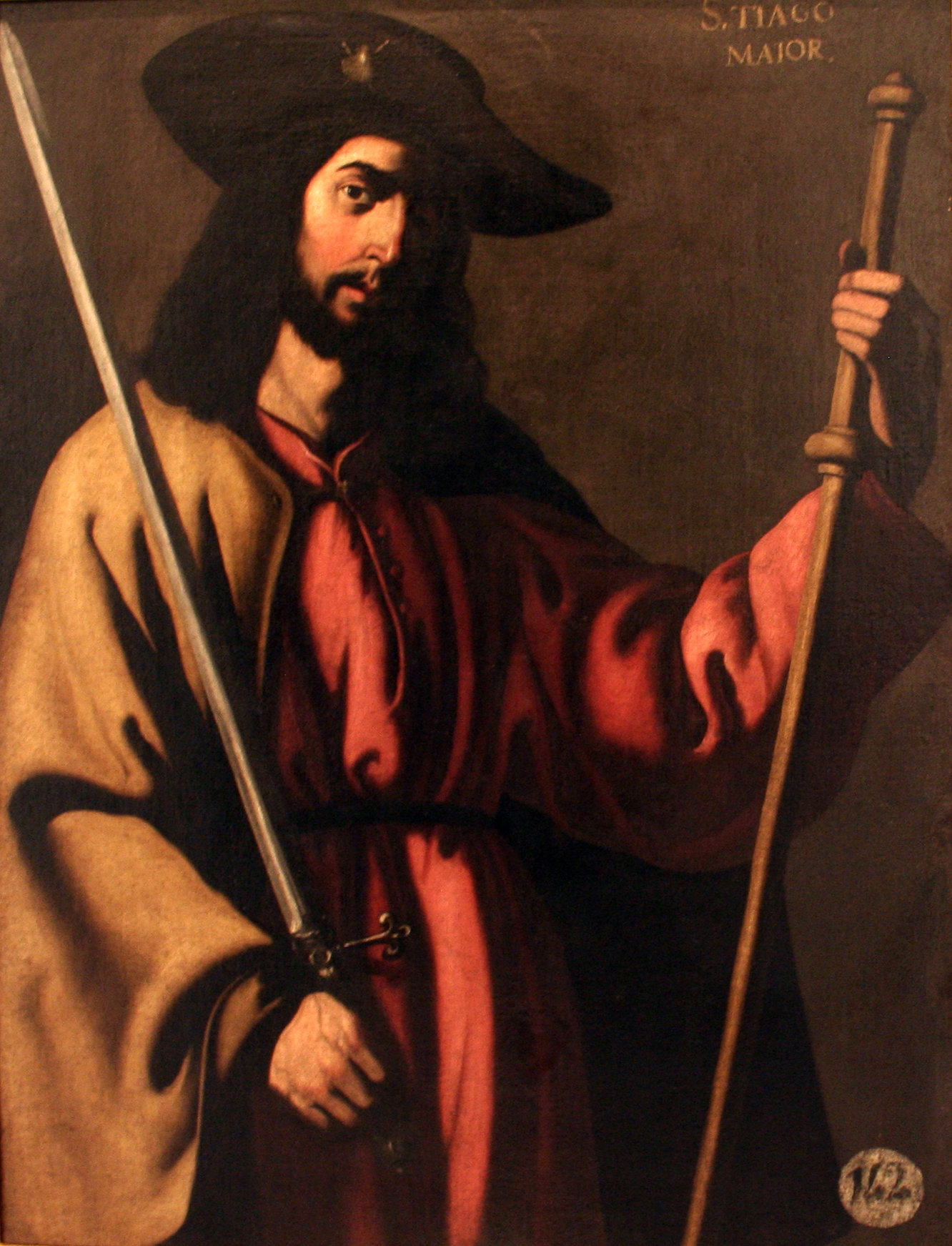 La obra representa al apóstol Santiago el Mayor.